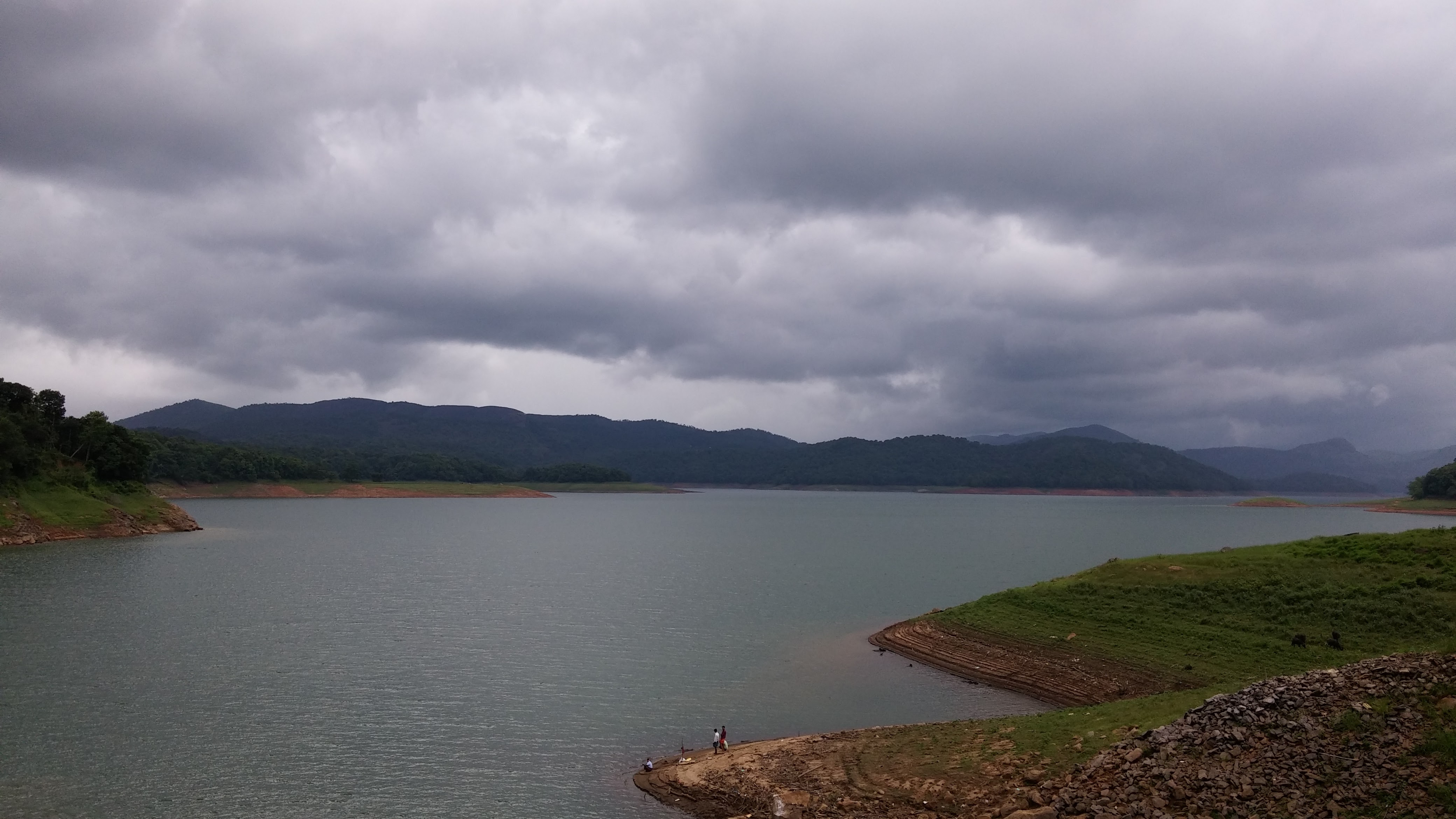 Anchuruli Kattappana